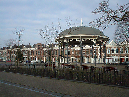 Pijnackerplein, Oude Noorden, Rotterdam